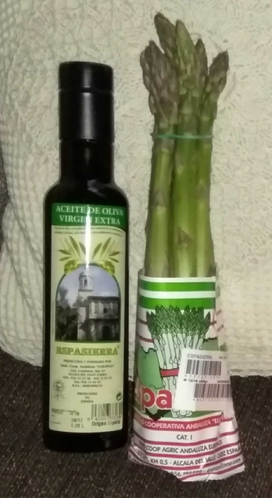 Botella de aceite de oliva virgen extra de 250 ml y manojo de espárragos de Alcalá del Valle.